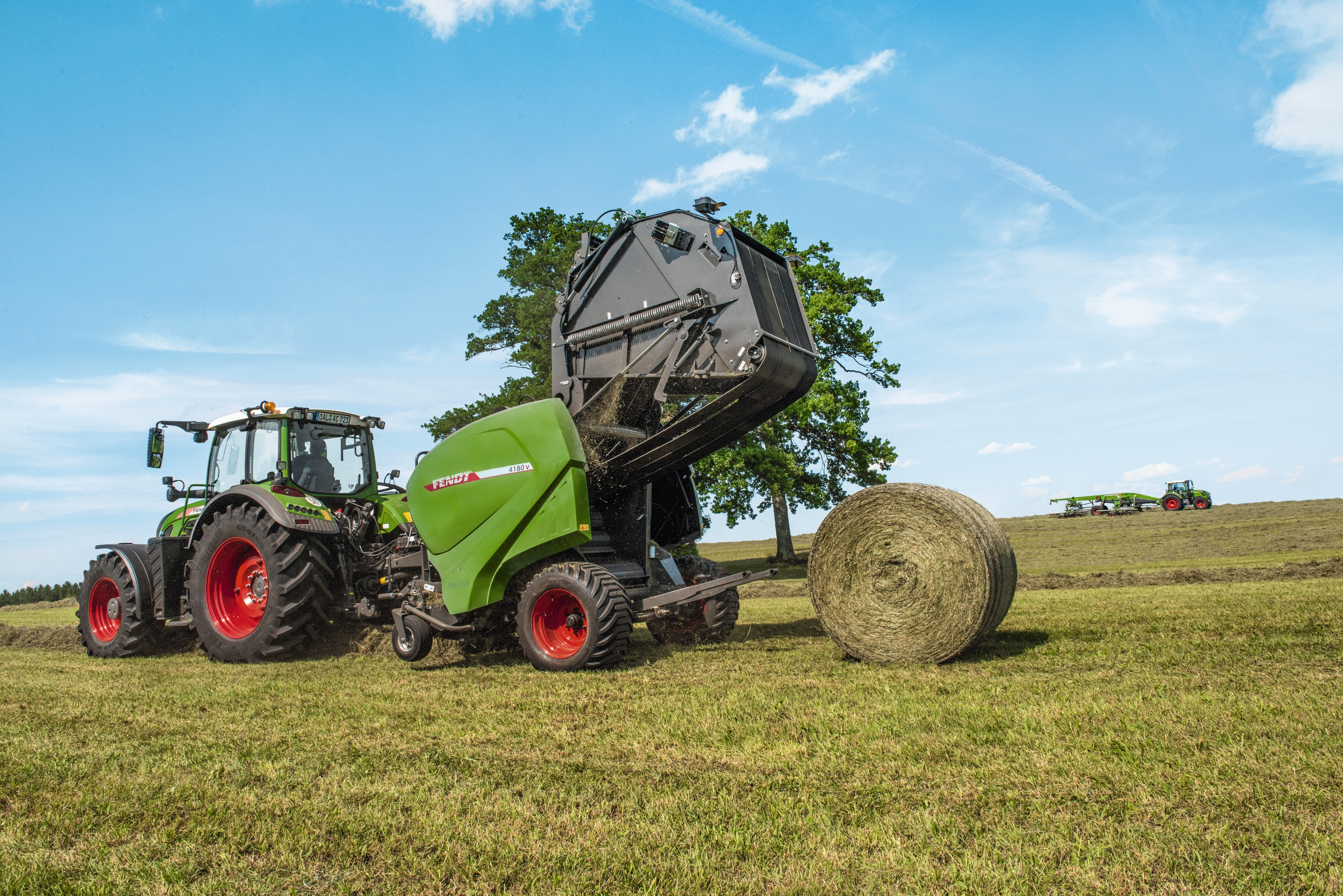 Fendt variable Rundballenpresse 4180 V